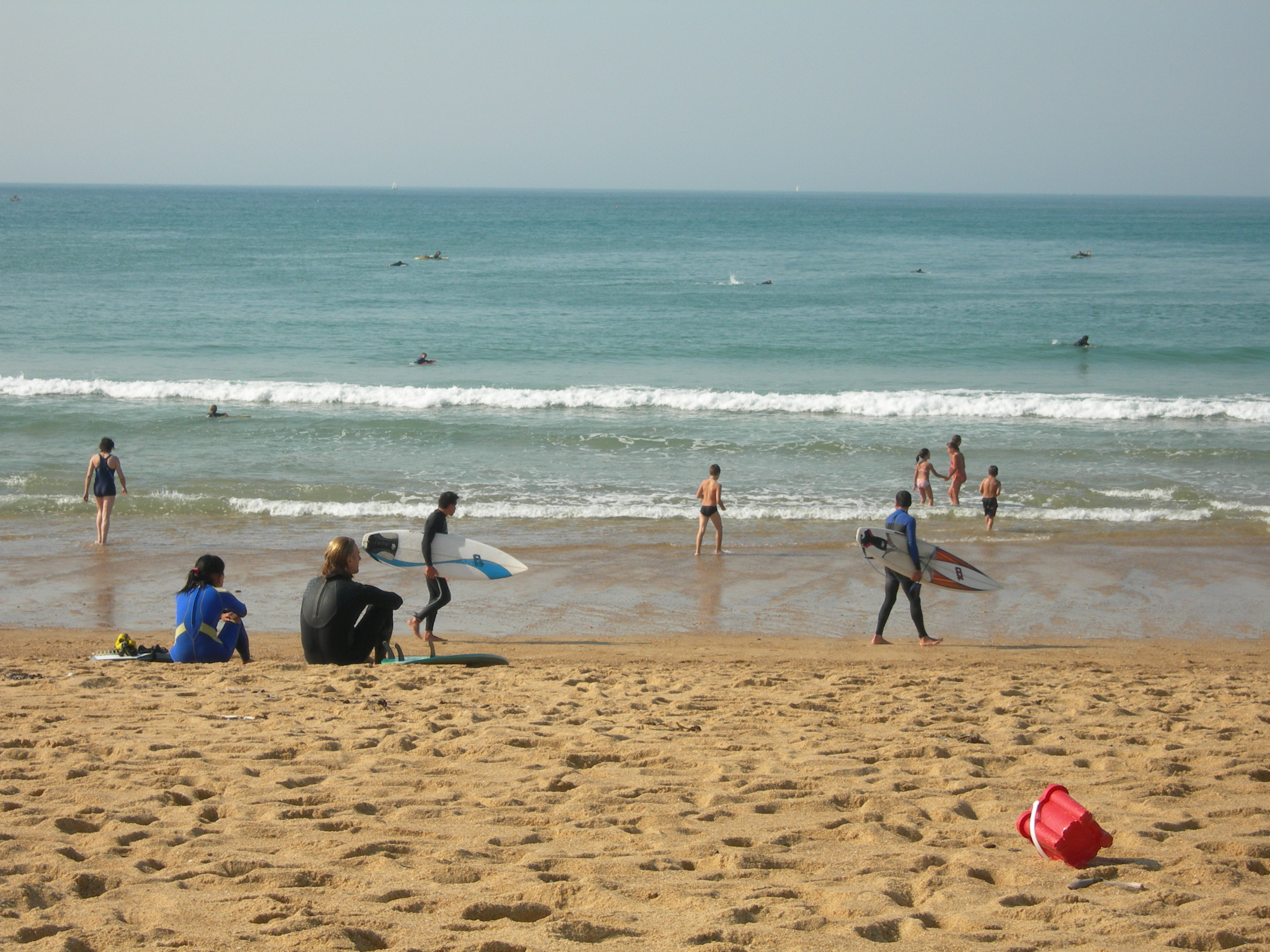 La plage d'Hossegor et ses surfeurs